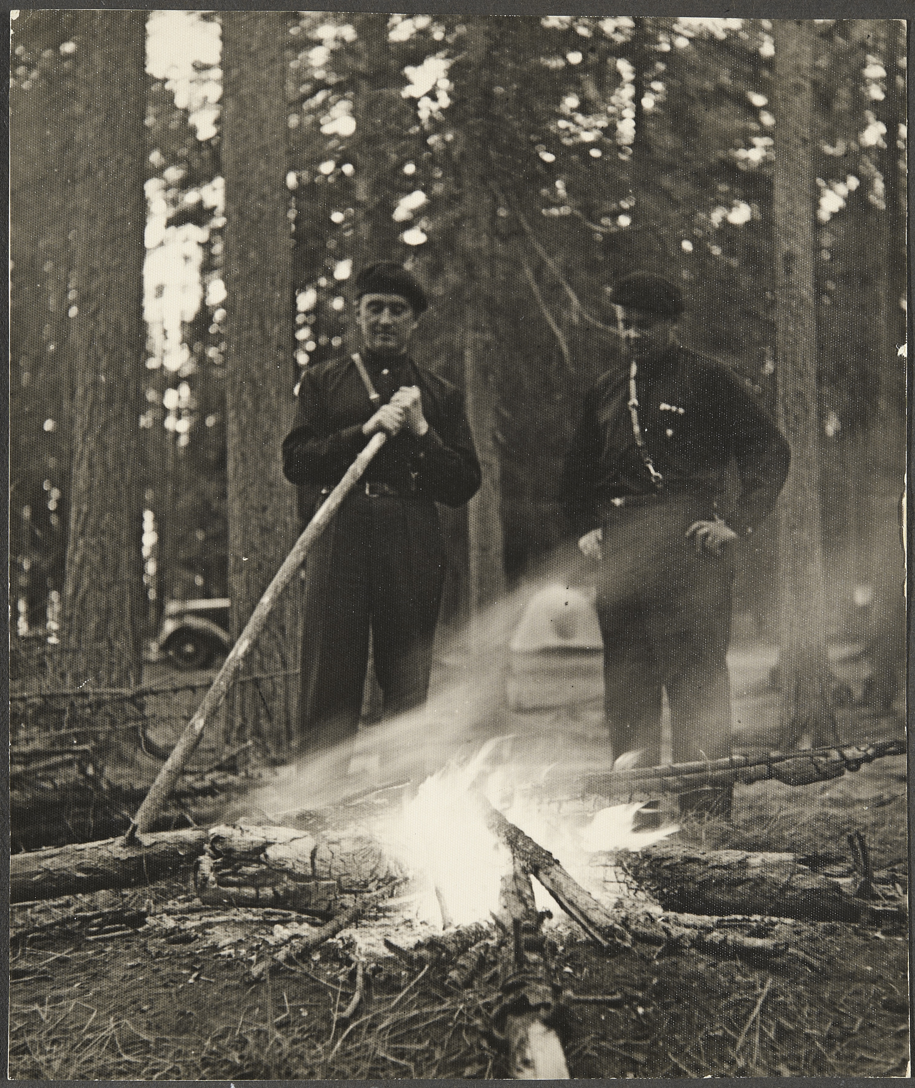 Elias Simojoki ja Reino Ala-Kulju Sinimustien Kuortaneen leirin leirinuotiolla vuonna 1935